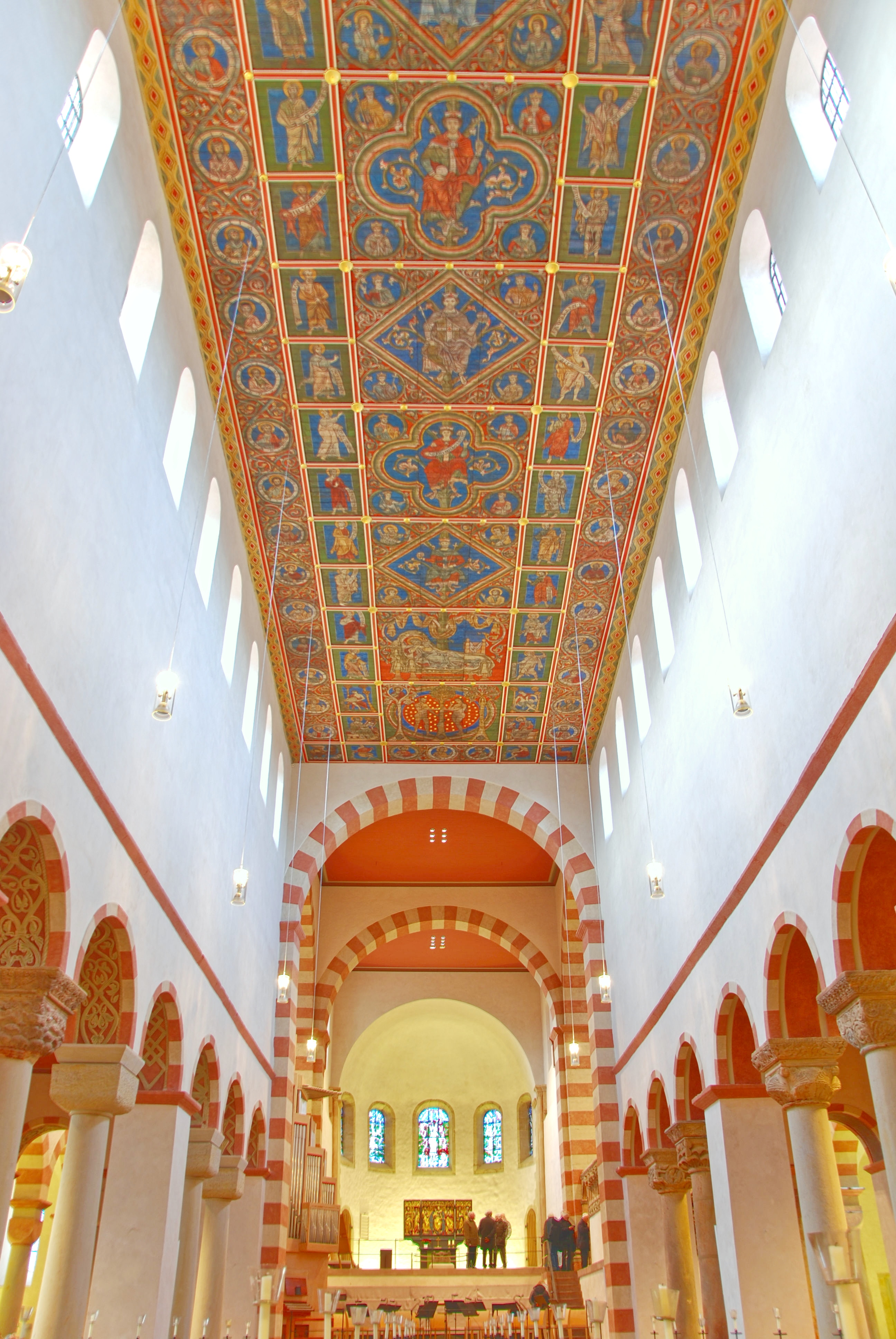 St. Michael (Hildesheim), Blick vom Hauptschiff Richtung Westen auf den Hohen Chor